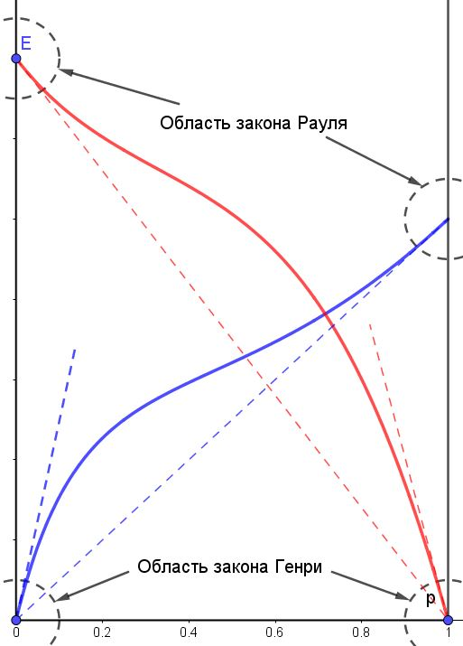 Сплошные кривые – зависимость парциальных давлений паров компонентов от состава бинарного раствора; длинные пунктирные линии – закон Рауля; короткие пунктирные линии – закон Генри.